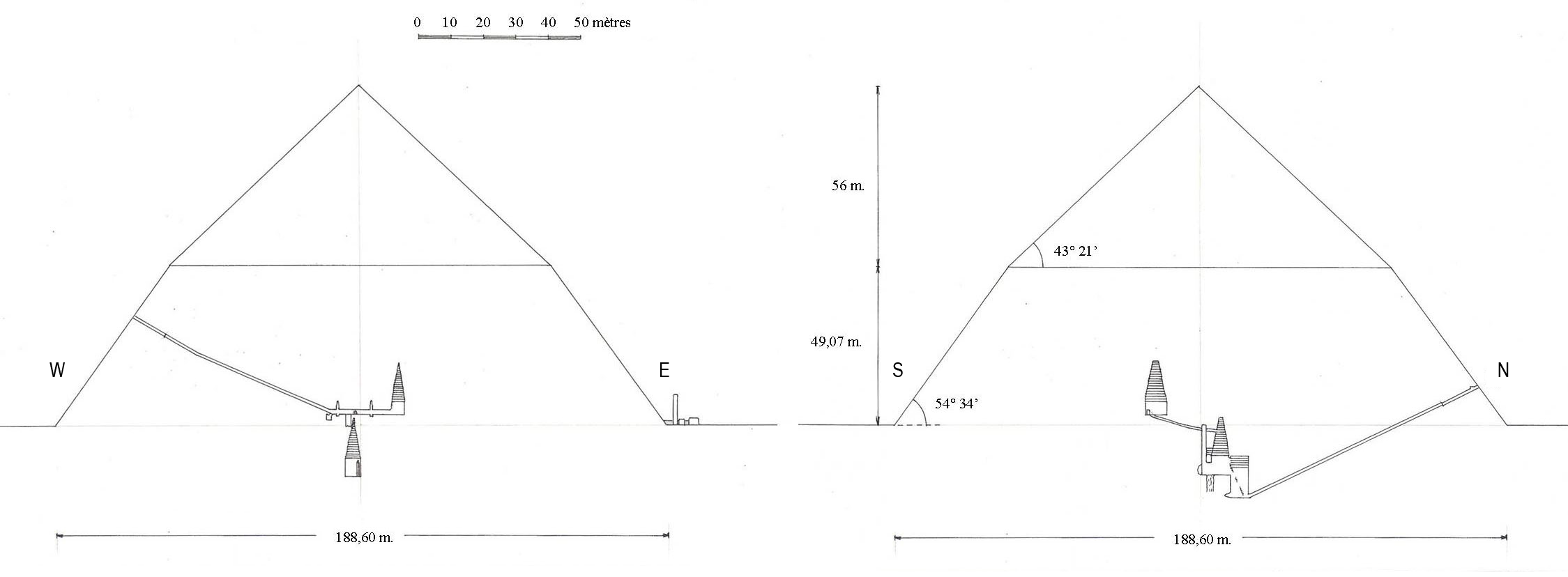 Plans en coupe des appartements funéraires de la pyramide rhomboïdale de Snéfrou à Dahchour